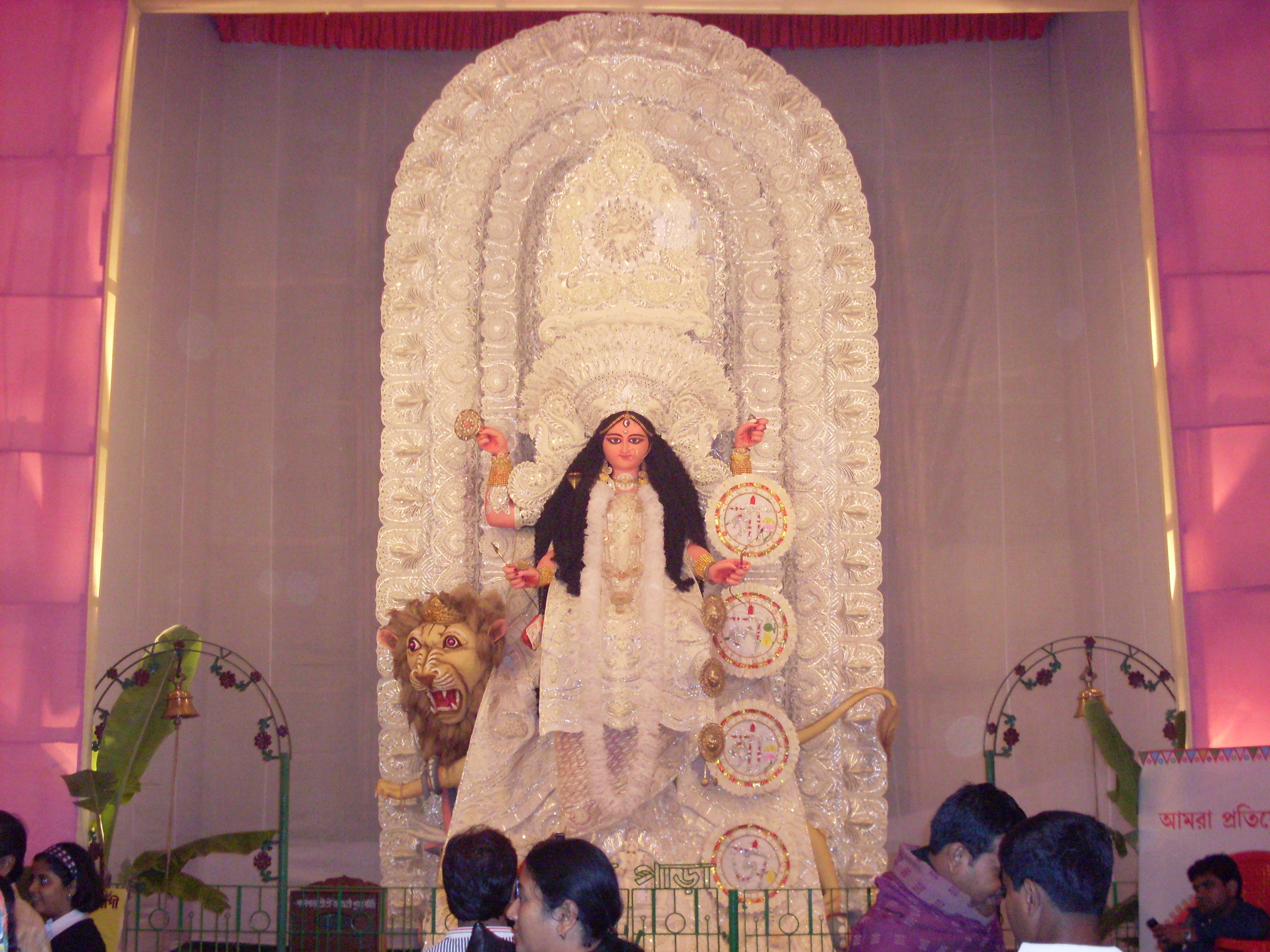 Jagaddhatri Puja1 Chandannagar 2009